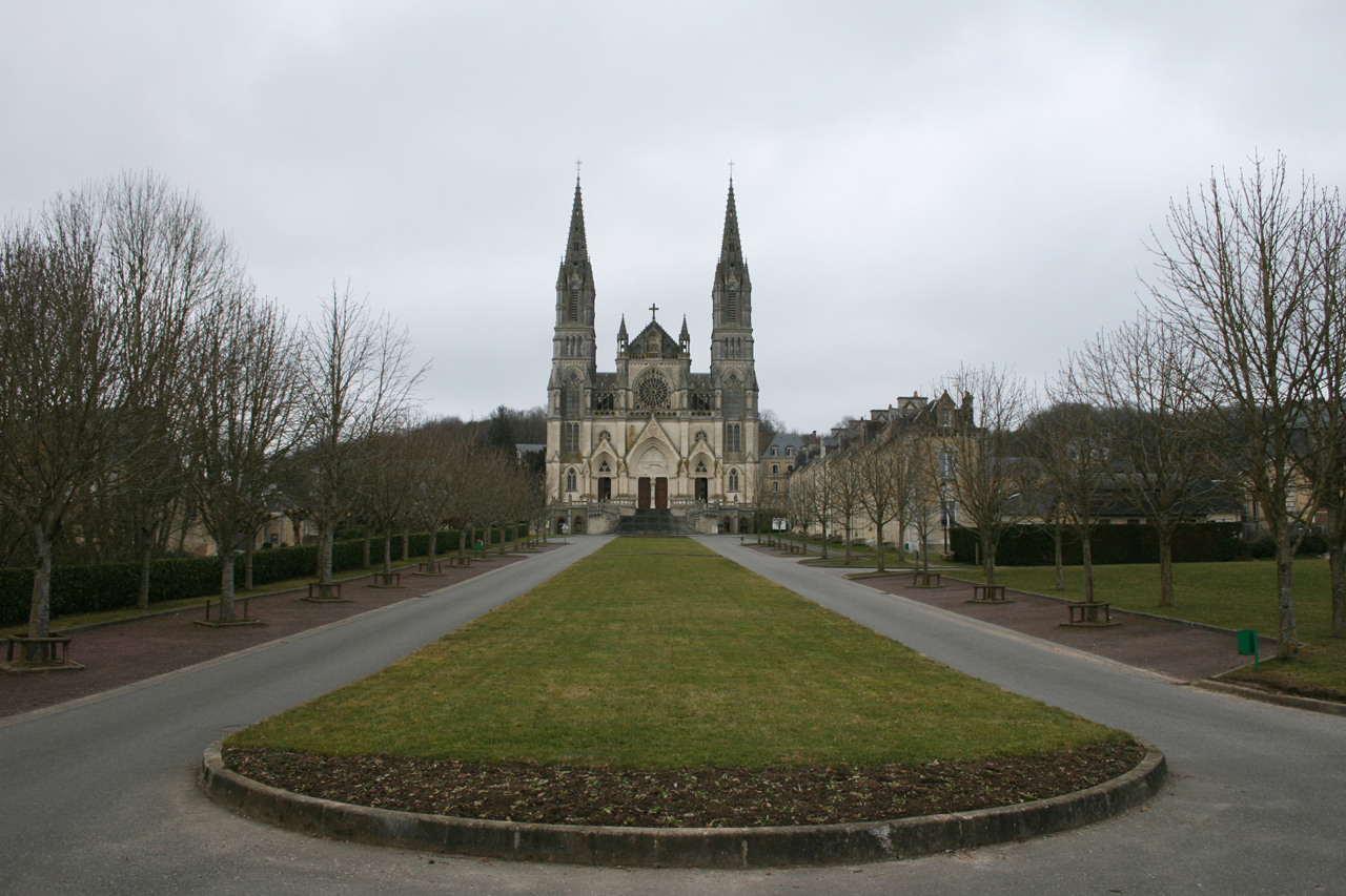 Notre-Dame de Montligeon à La Chapelle-Montligeon ( Orne )